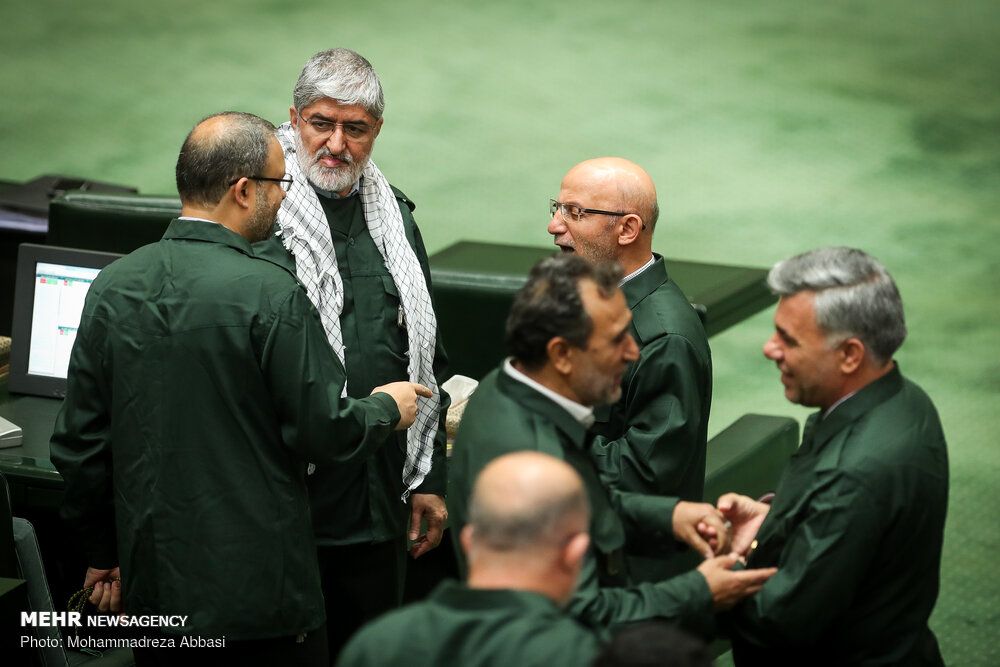 حضور نمایندگان مجلس شورای اسلامی ایران با یونیفرم سپاه پاسداران انقلاب اسلامی در جلسهٔ علنی ۲۰ فروردین ۱۳۹۸، به مناسبت روز پاسدار و در محکومیت اقدام دولت ایالات متحدهٔ آمریکا به قرار دادن سپاه پاسداران در فهرست گروه‌های تروریستی